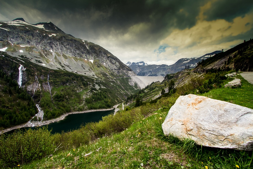 am Endpunkt der Malta_Hochalmstraße (aus ca. 1900 m ü. M. fotografiert)